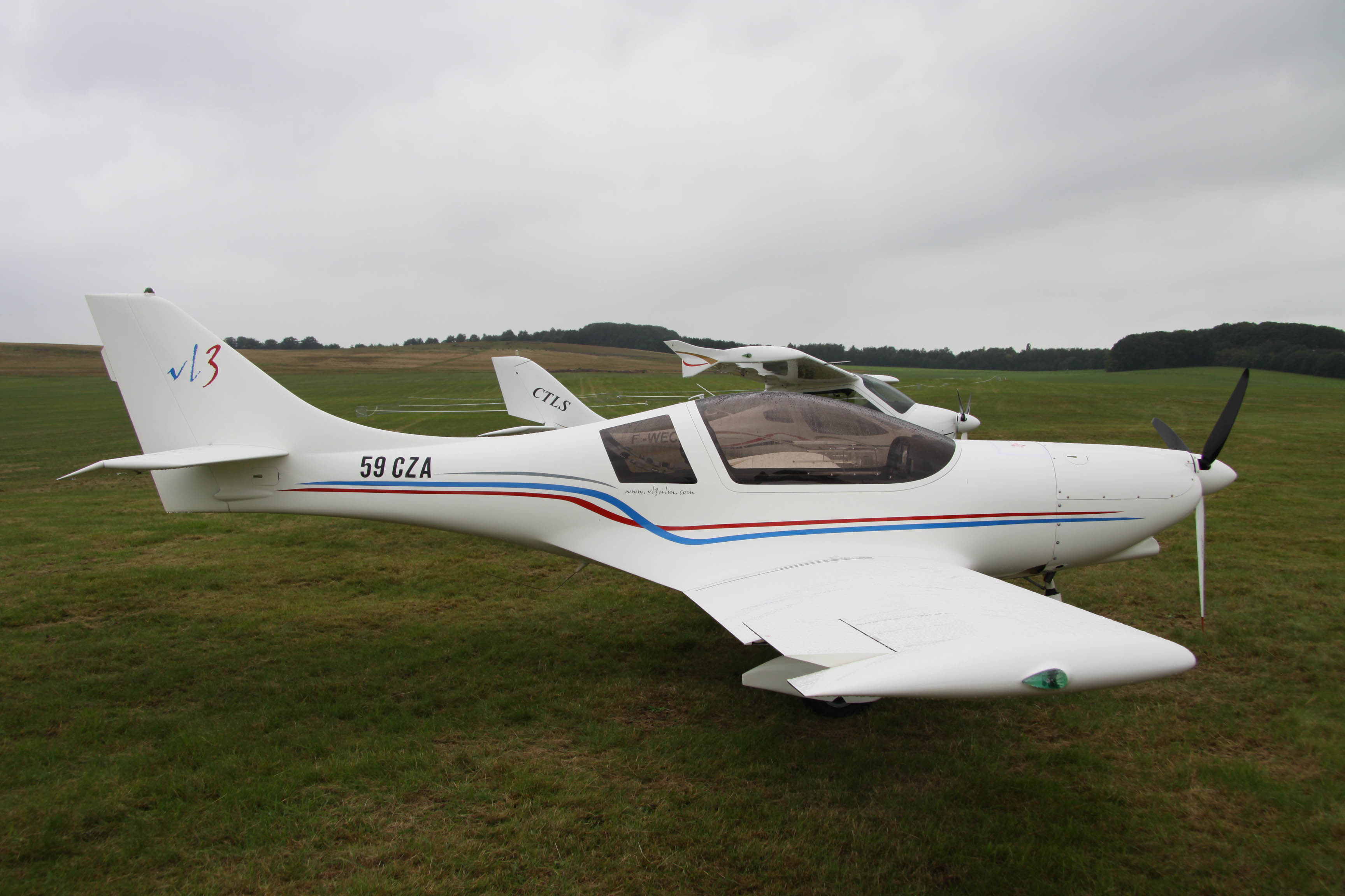 59-CZA Aveko VL-3 Sprint